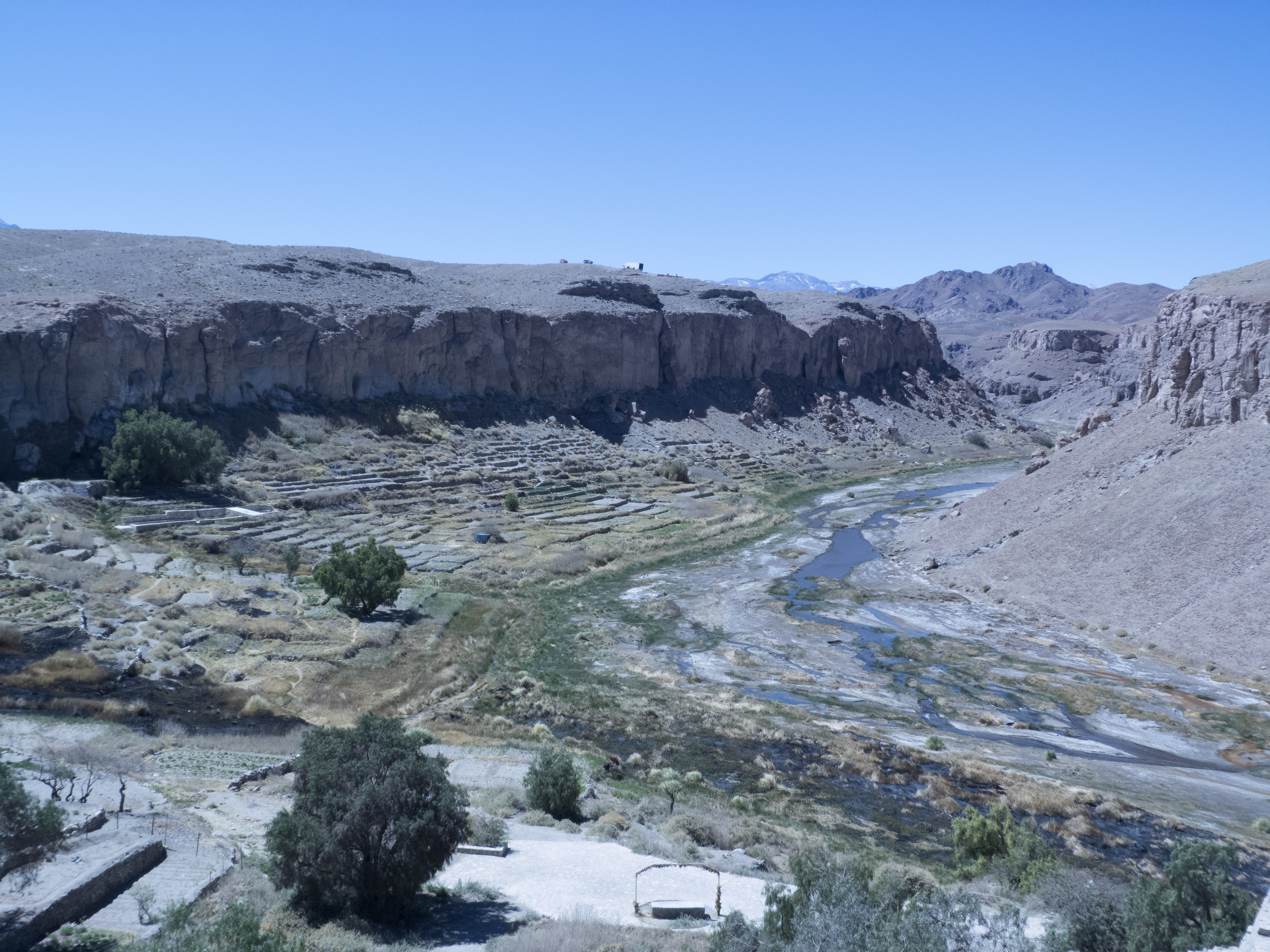 Plantación Aymara típica en el poblado de Ayquina, donde se disponen cultivos en terrazas para el riego This is a photo of a national monument in Chile: 550